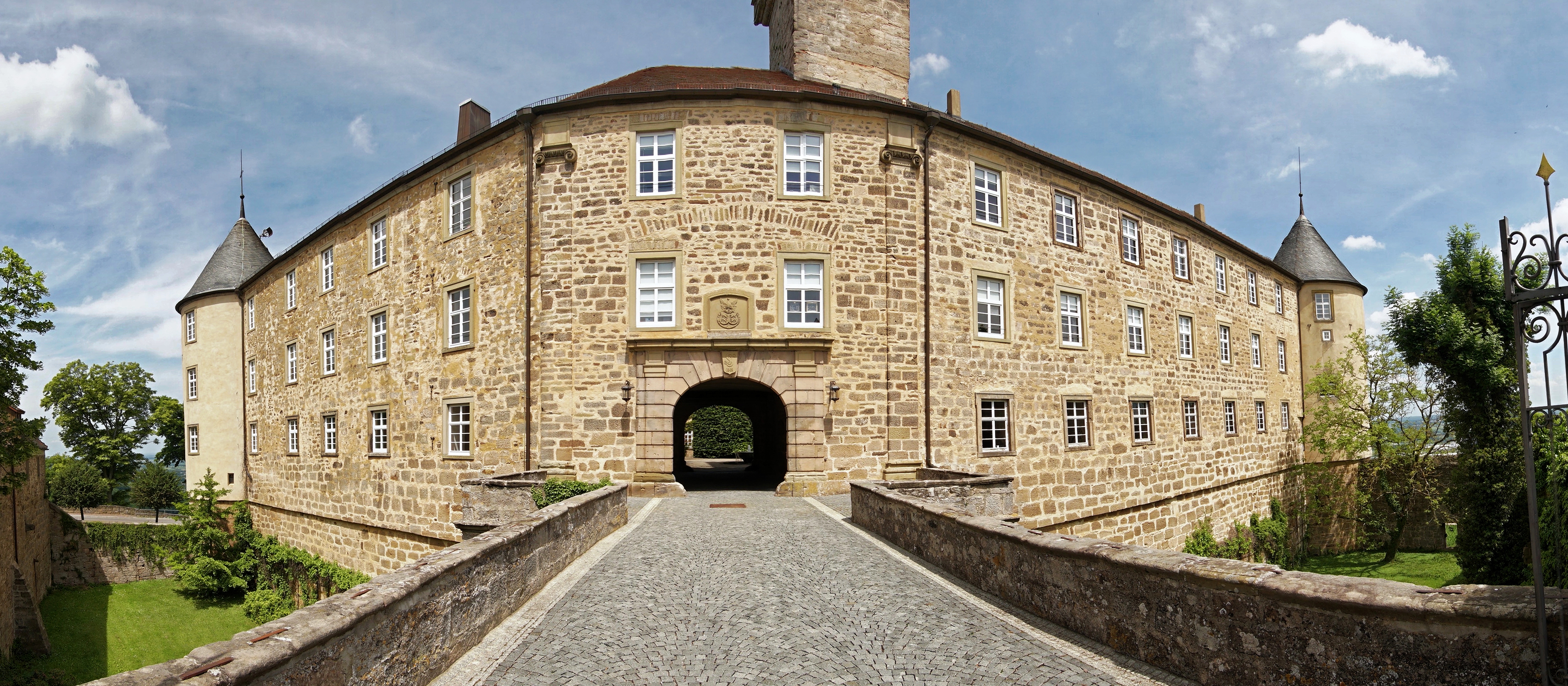 Das Waldenburger Schloss.